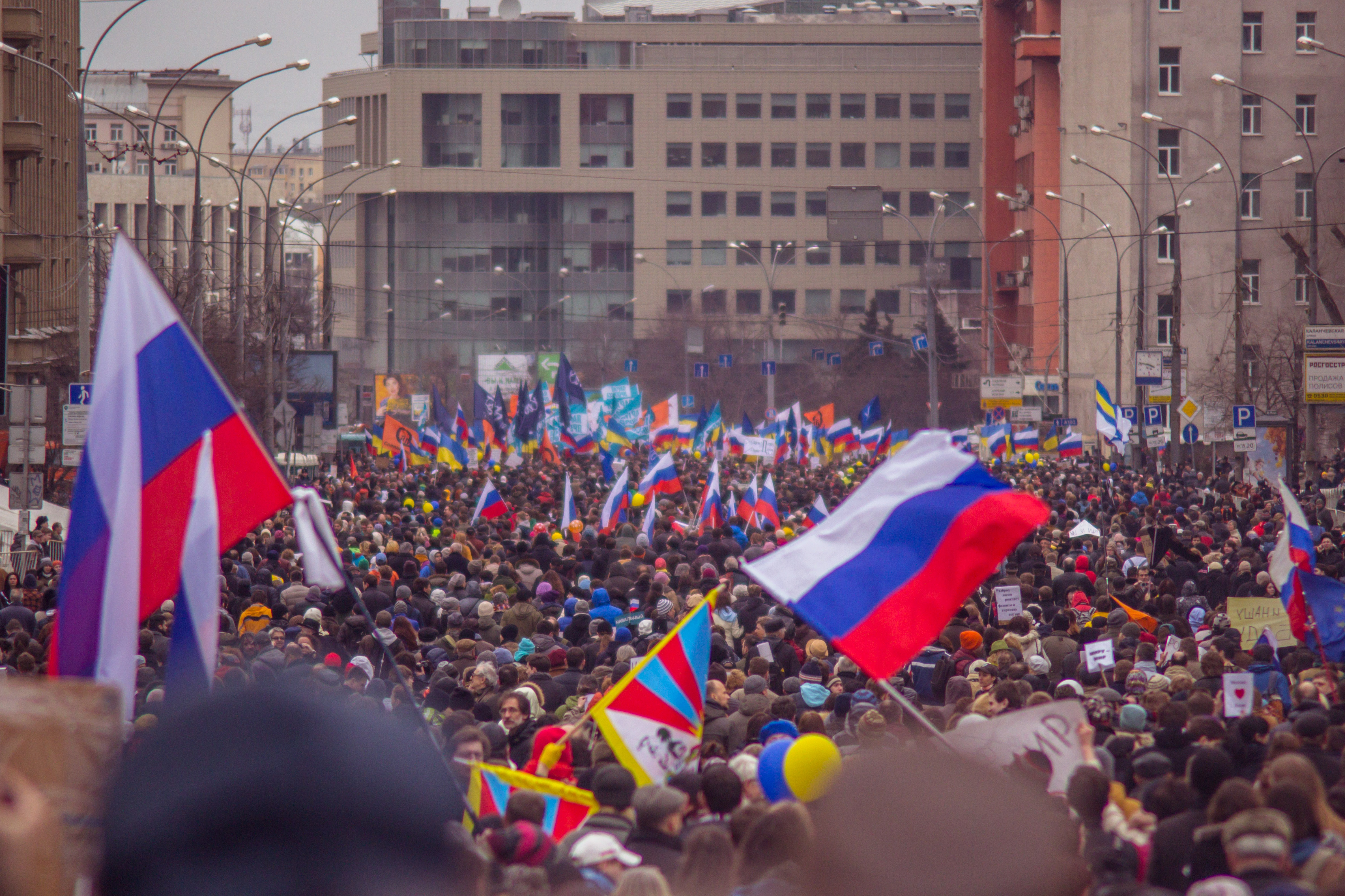 Марш мира — многотысячная антивоенная акция протеста в Москве